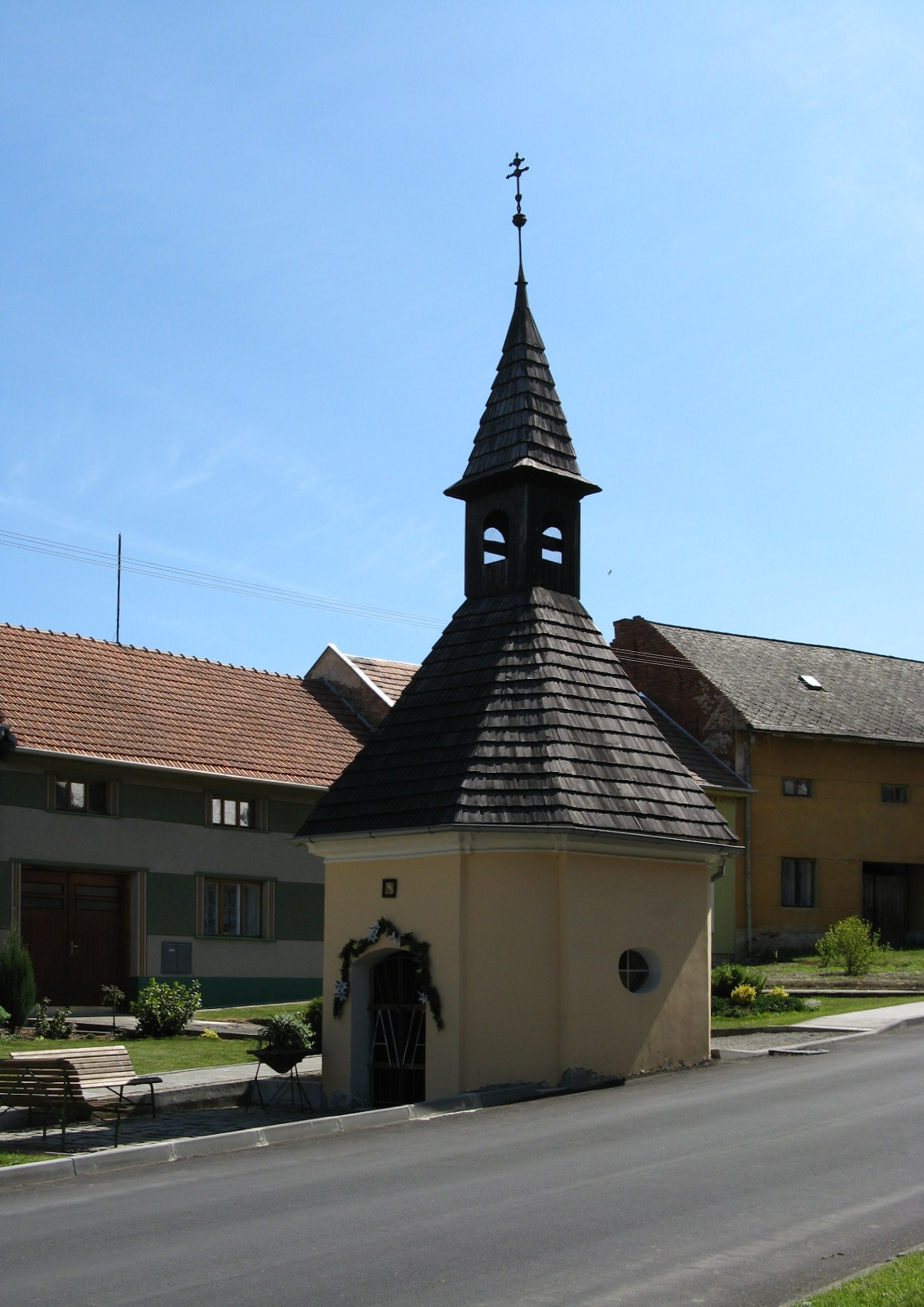 Kaplička P. Marie (Osíčany), náves, Osíčany